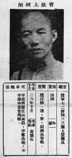 中文（台灣）: 抗戰軍人忠烈錄第一輯中的烈士遺像